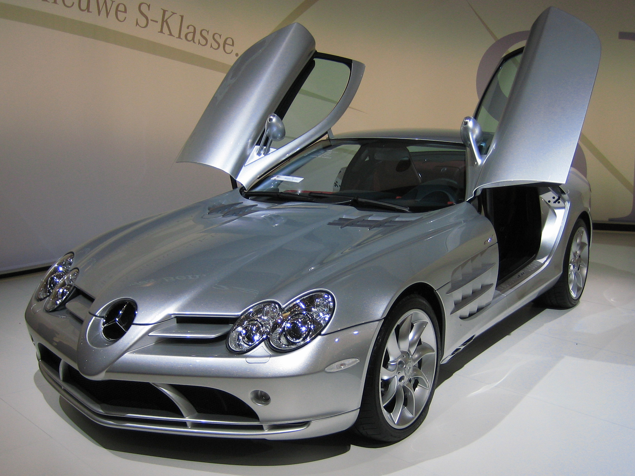 Mercedes-Benz SLR McLaren (Brussel 2006)